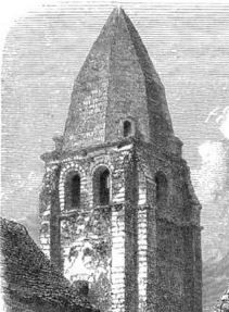 Clocher du prieuré St Jean-du-Grais